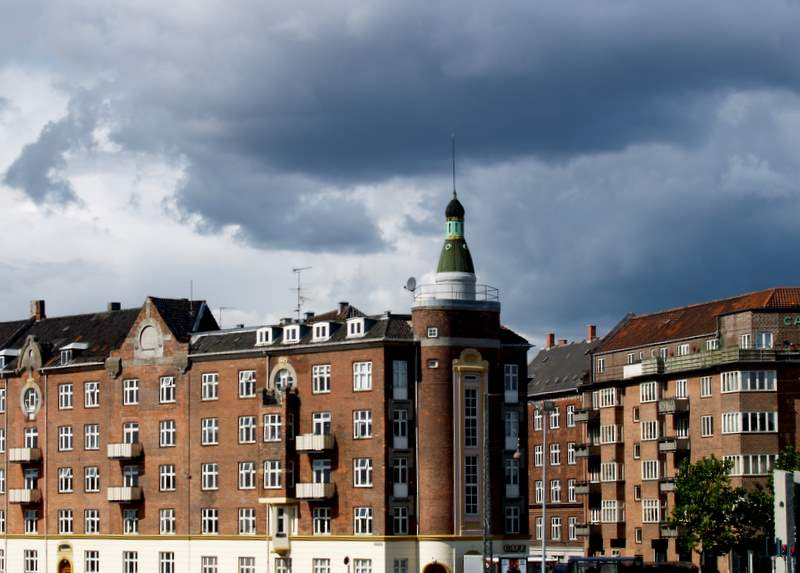 Ingerslevsgde as seen from Dybølsbro in Copenhagen, Denmark